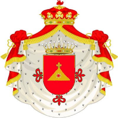 Armas de Despuig sobre cruz de Calatrava y manto de GdE